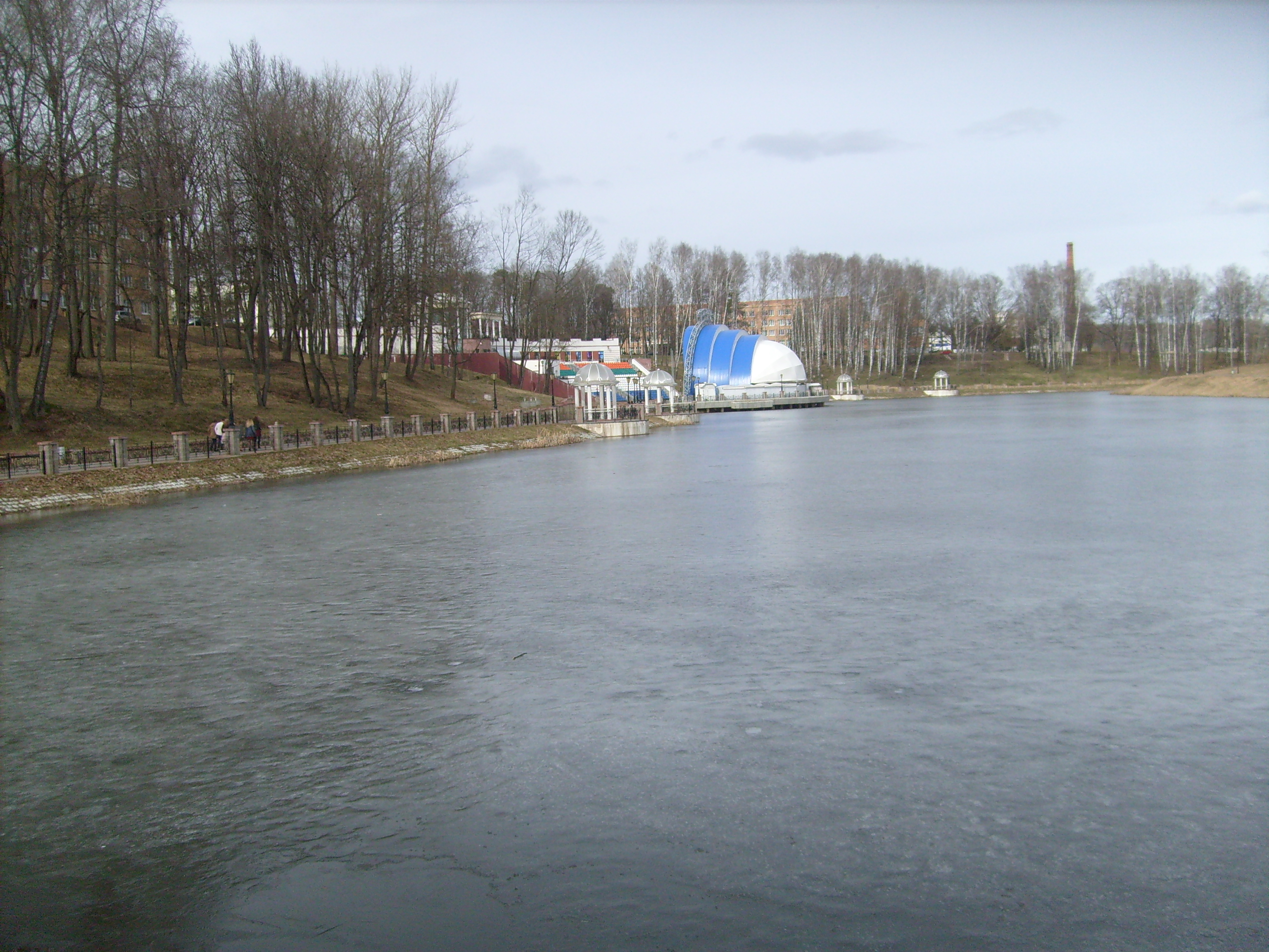 Белорусская сельскохозяйственная академия. Нижнее озеро